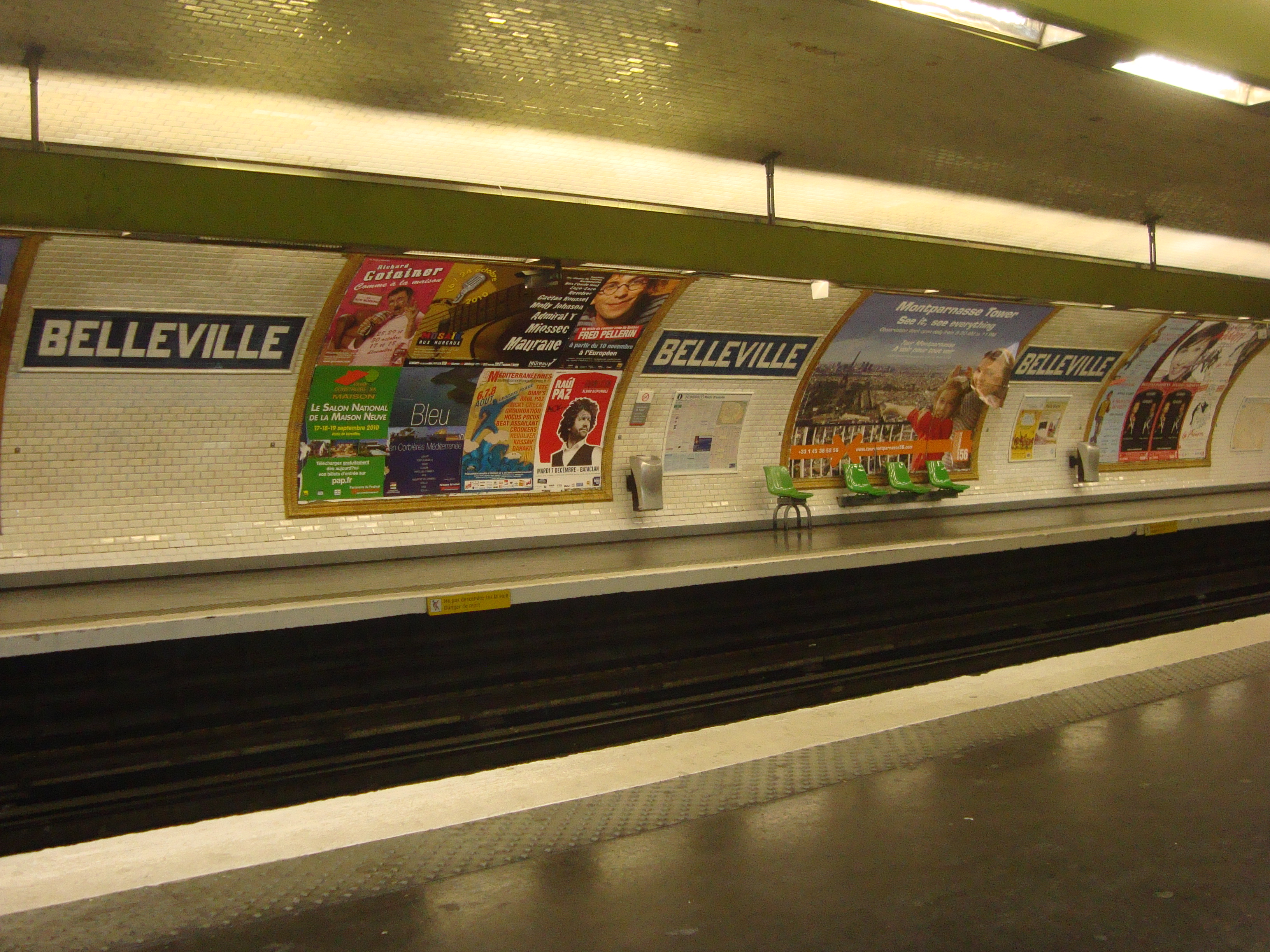 Quais de la station Belleville sur la ligne 11 du métro